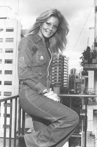 Fotografía blanco y negro sobre papel fotográfico brillante. Retrato de Graciela Alfano en primer plano, de cuerpo entero, de pie en un balcón. Mira a cámara, sonríe y apoya el pie derecho sobre los barrotes de la baranda. Viste pantalón de jean, sandalias con plataforma, y campera corta de jean con cierre delantero.